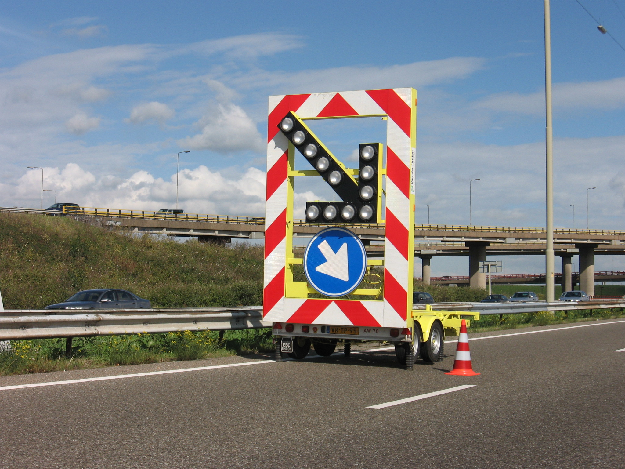 actiewagen